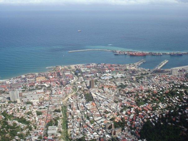 Vistas aereas de La Guaira, estado Vargas - Venezuela (2008)